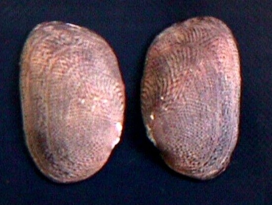 Foto de Diplodon (Diplodon) granosus granosus Especie de Vivalvo d ela familia Hyridae del Alto Río Siapa, Municipio Río Negro, Estado Amazonas - Venezuela.